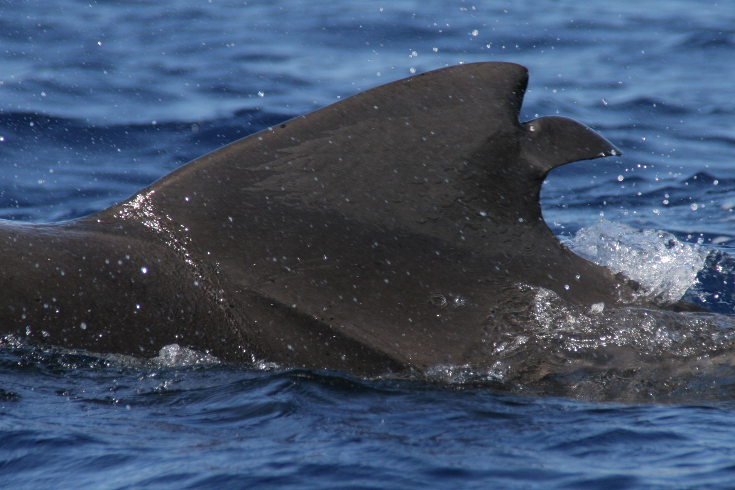 Kurzflossen-Grindwal (Globicephala macrorhynchus) mit verletzter Rückenflosse (Finne) - Mögliche Ursache: Kollision mit einem Boot